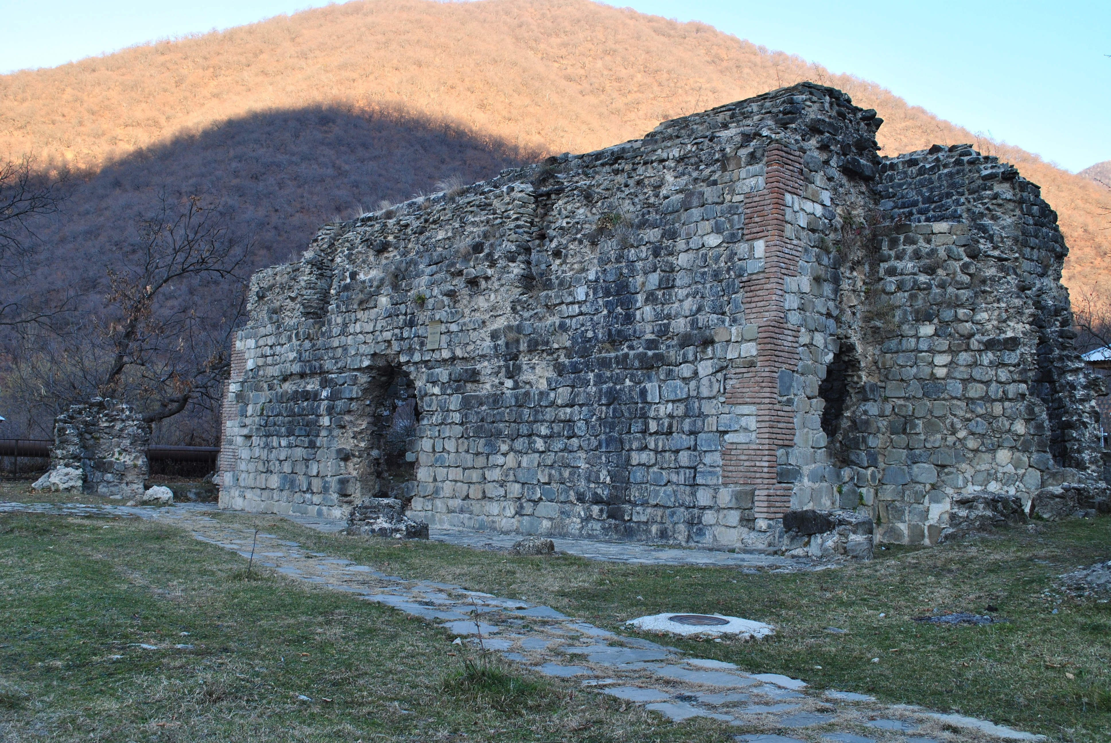 Qum bazilikası